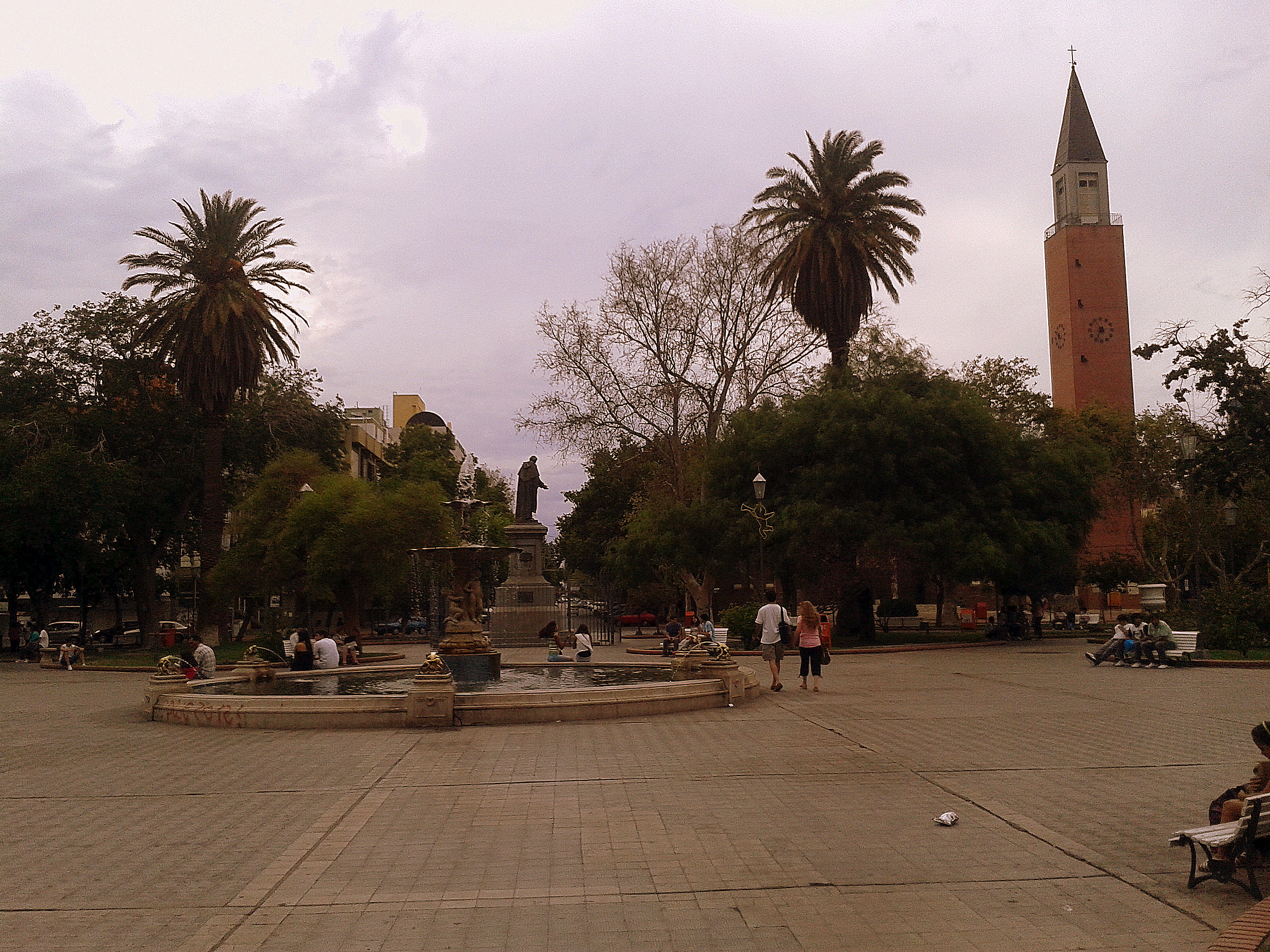 VISTA DESDE LA PLAPLAZA HACIA LA CATREDRAL